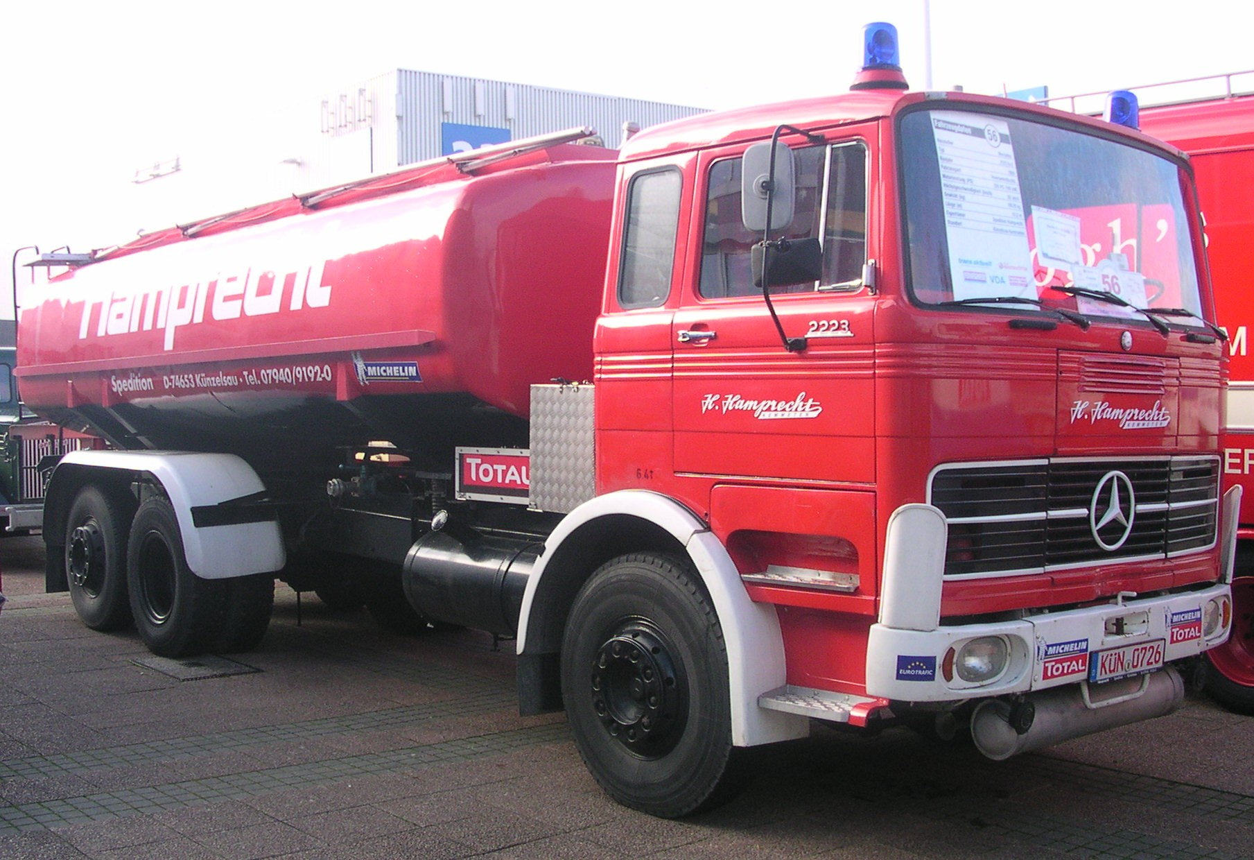 Nutzfahrzeug-IAA, Hannover 2004 Mercedes 2223 (kubische Kabine) Feuerwehrtankwagen, dreiachsig